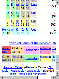 schermdump Pocket PC zelf gemaakt